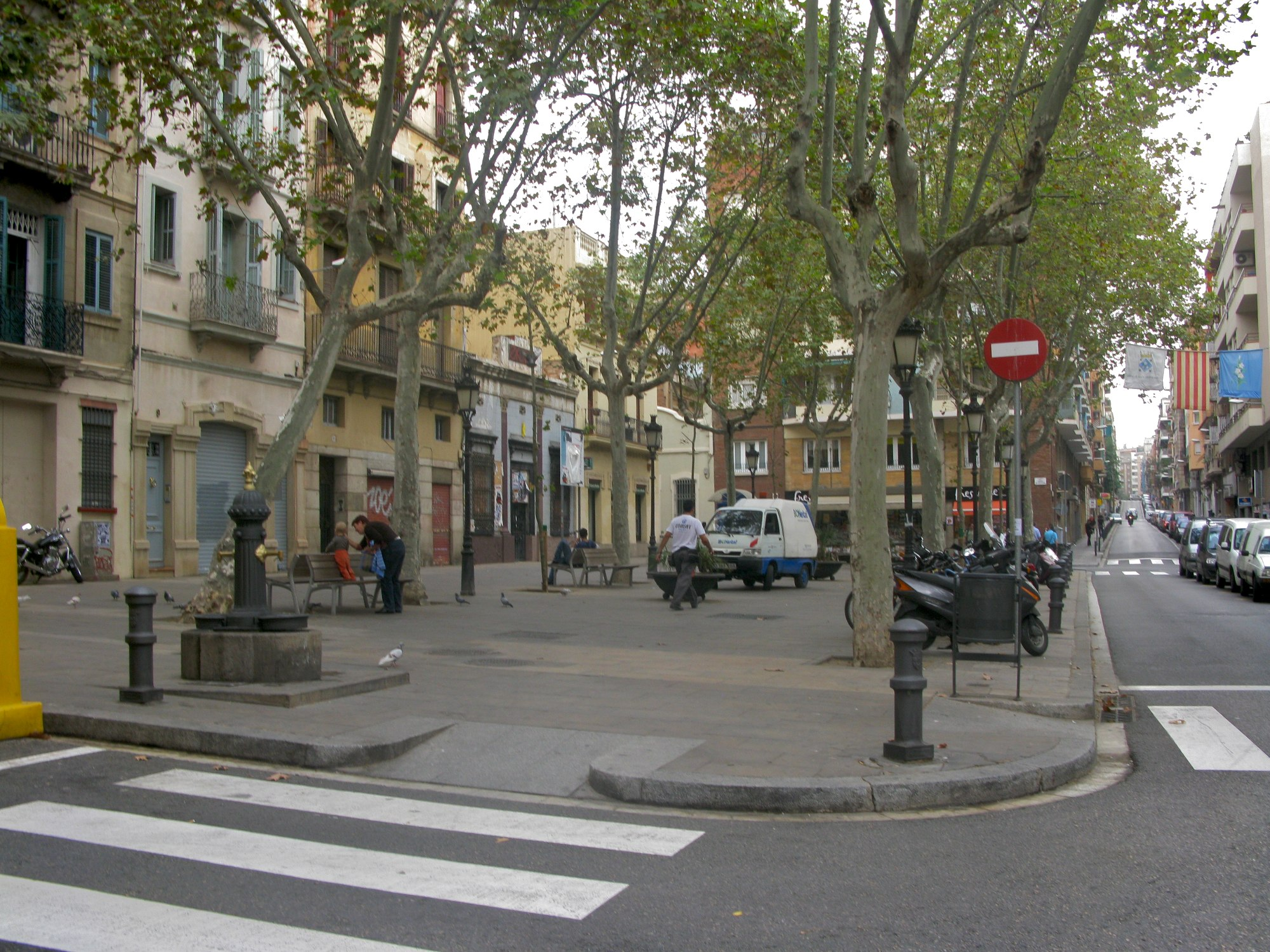 Barcelona Grâcia 12